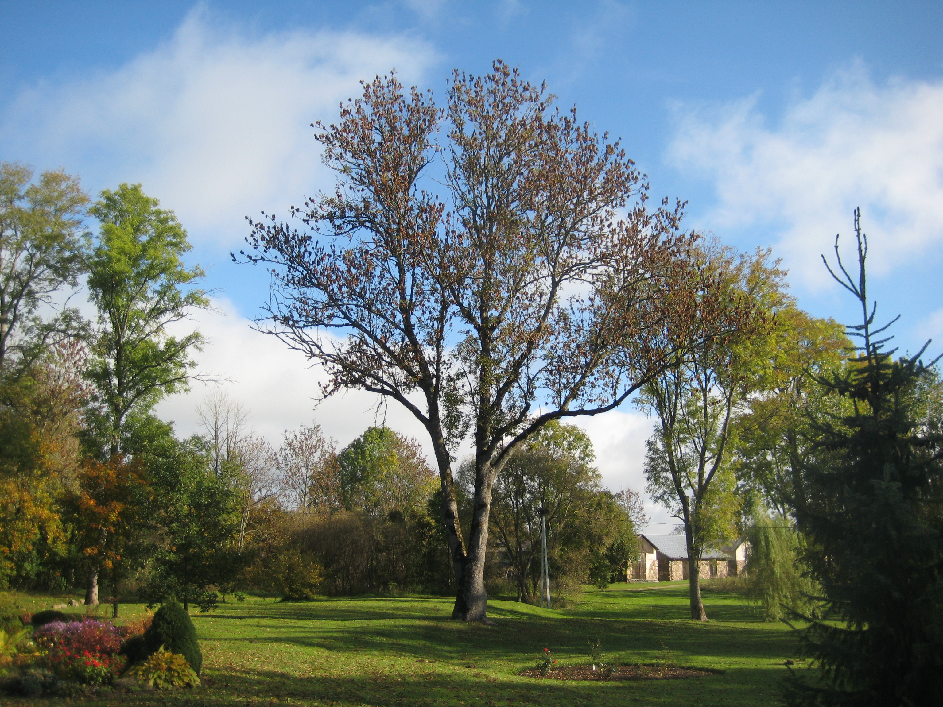 Gačionys 42260, Lithuania